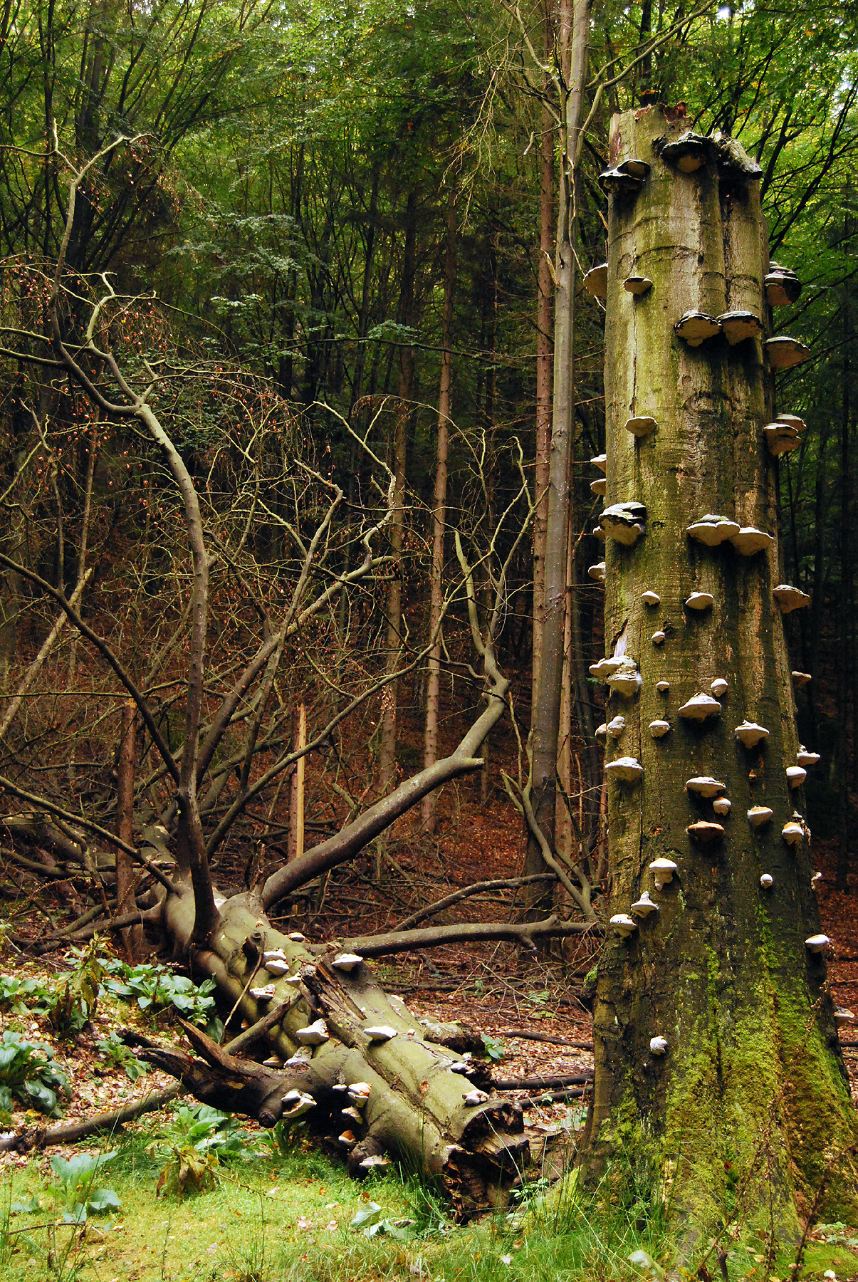 pilzbewachsener Stamm im Großen Zschand nahe Zeughaus in der Hinteren Sächsischen Schweiz